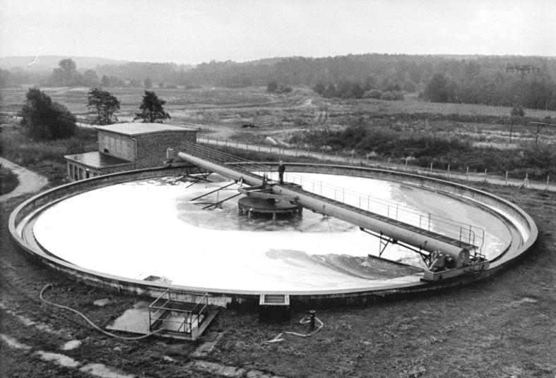 Güstrow, Zuckerwerk, Klärwerk ADN-ZB Pätzold-2.10.84 Bez.Schwerin: Rübenverarbeitung- Mit nur 1,2 Kubikmeter Wasserverbrauch pro Tonne Rüben erreichen die Güstrower Zuckerwerker Spitzenwerte bei der effektiven Wassernutzung. Zum System der Wasseraufbereitung gehören zwei Rundklärbecken, in denen der Dickschlamm abgetrennt und das gereinigte Wasser in den Produktionskreislauf zurückgeführt wird. - siehe auch 1984-1002-3 und 4N